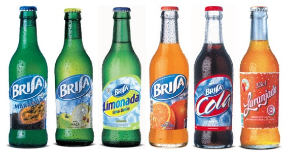 brisa